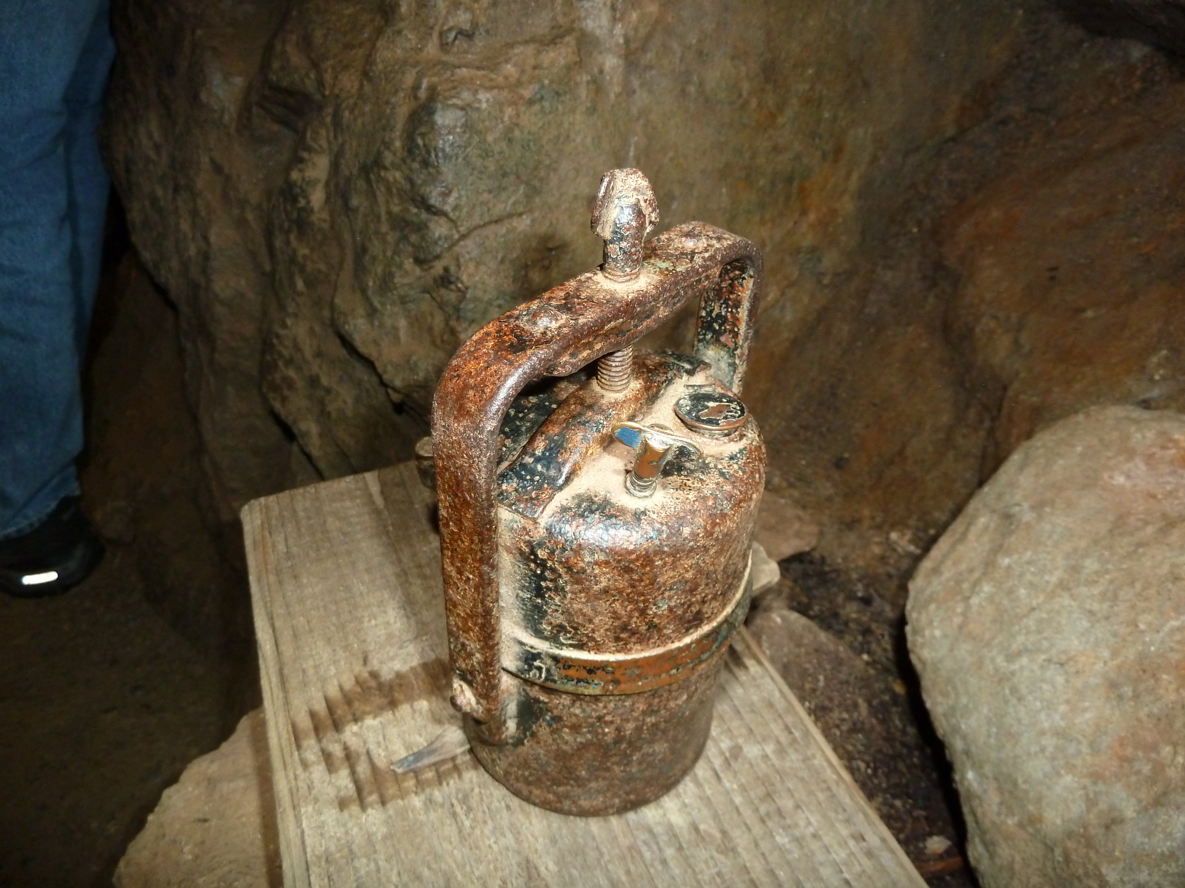 Karbidlampe im Museumsbergwerk Schauinsland